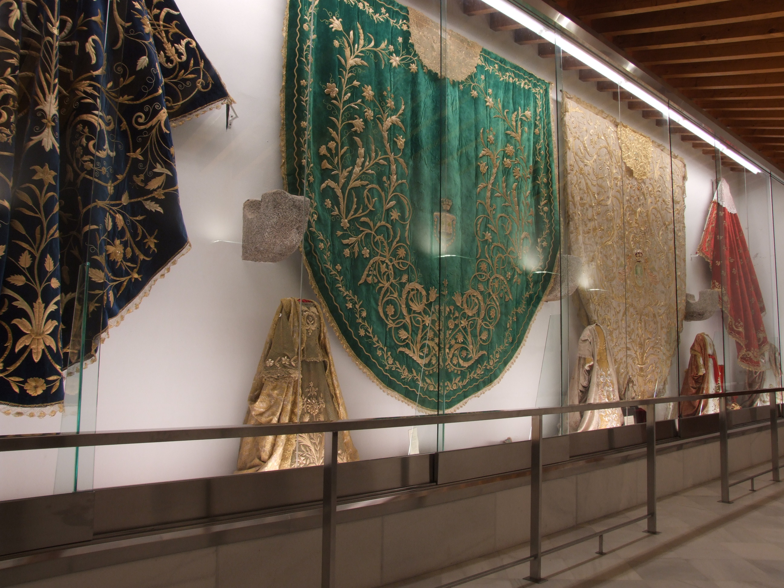 Mantos